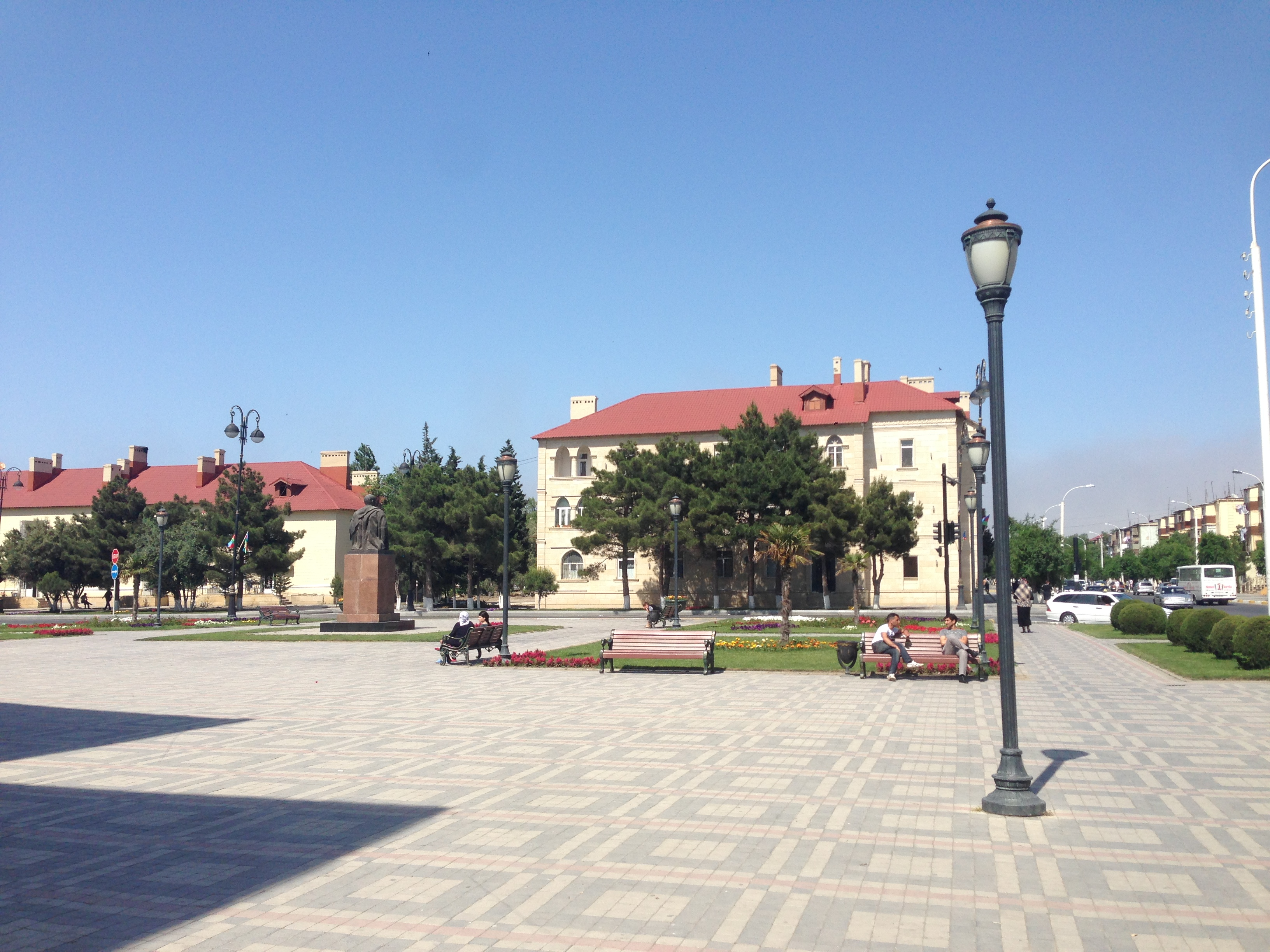 Жилые дома в Сумгайыте